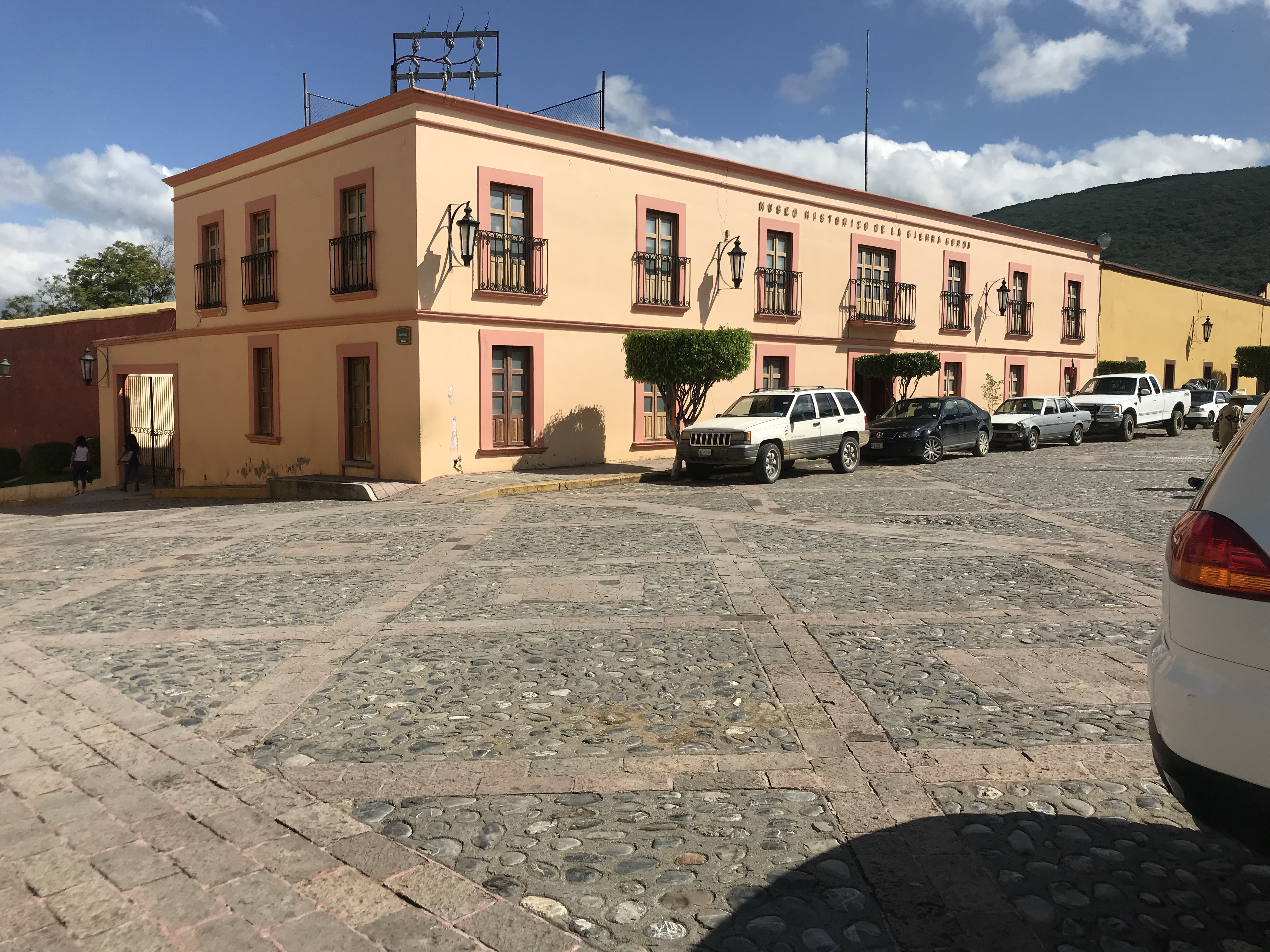 Museo Historico de la Sierra Gorda, Jalpan.